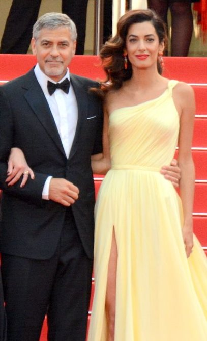 Présentation de "Money Monster" au festival de Cannes